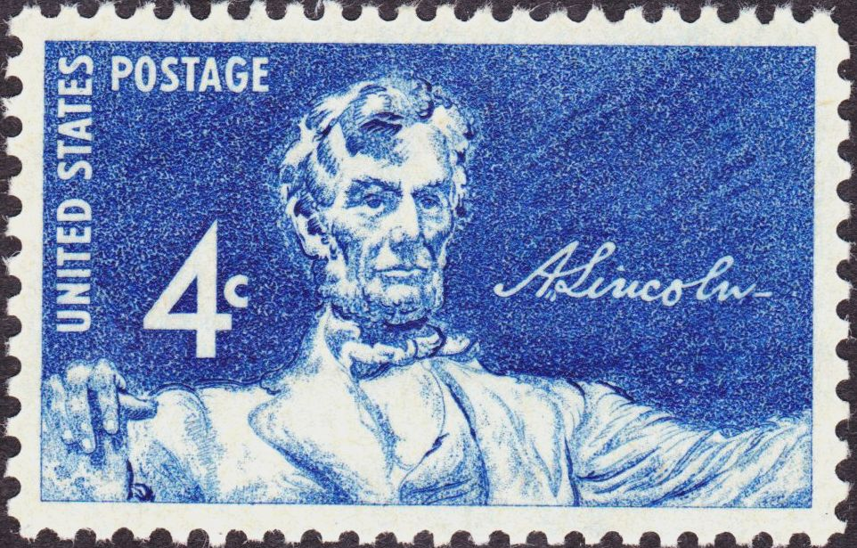 US Postage: Lincoln_Memorial_Issue 1959-4c.jpg